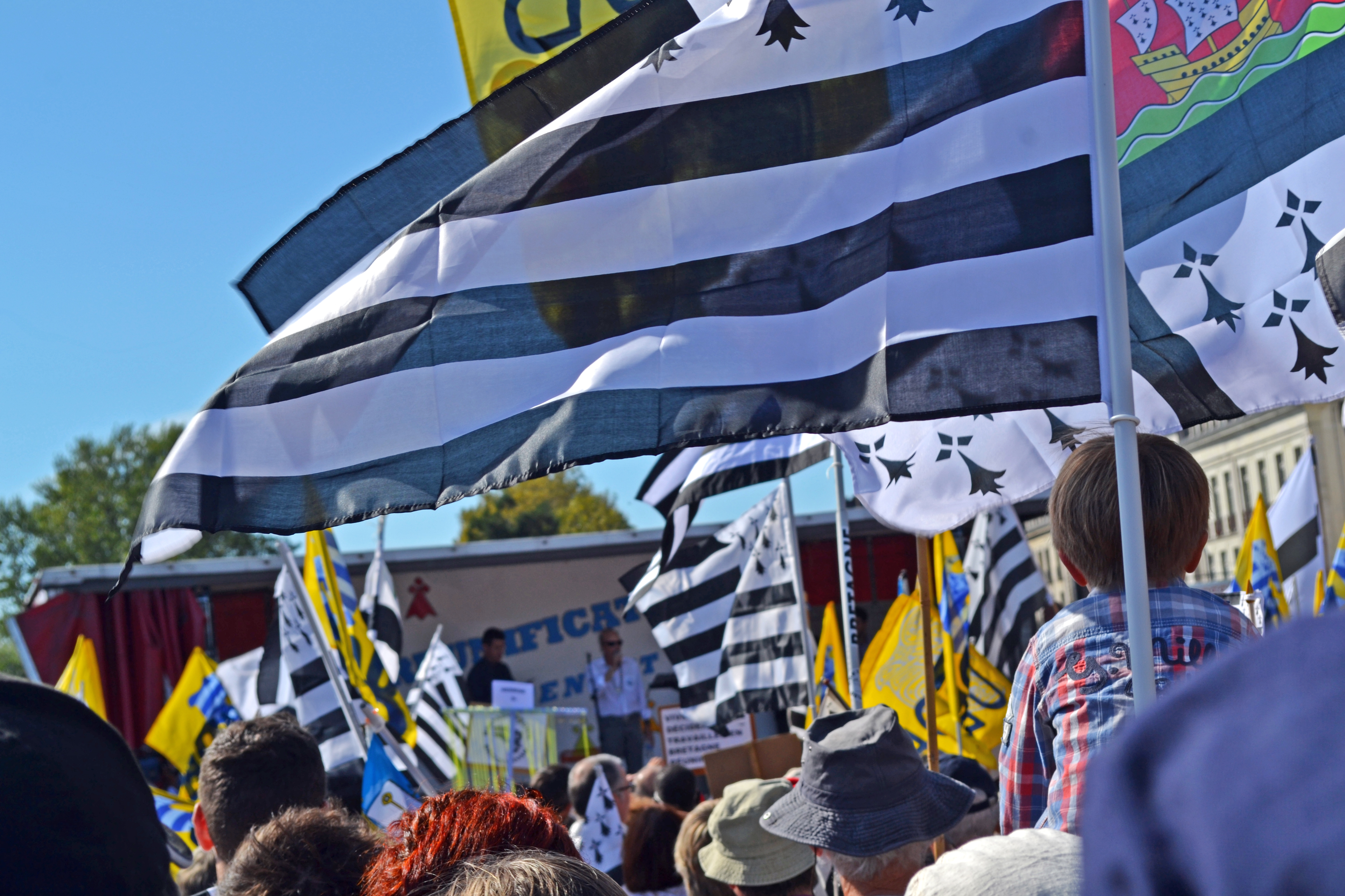 Des milliers de drapeaux bretons brandis à Nantes le 27 septembre 2014 pour célébrer la Bretagne entière et son projet d'avenir commun. La 3e grande manifestation populaire de l'année revendiquait une cohérence territoriale, économique, culturelle, pour que la péninsule plus que millénaire conserve son unité.